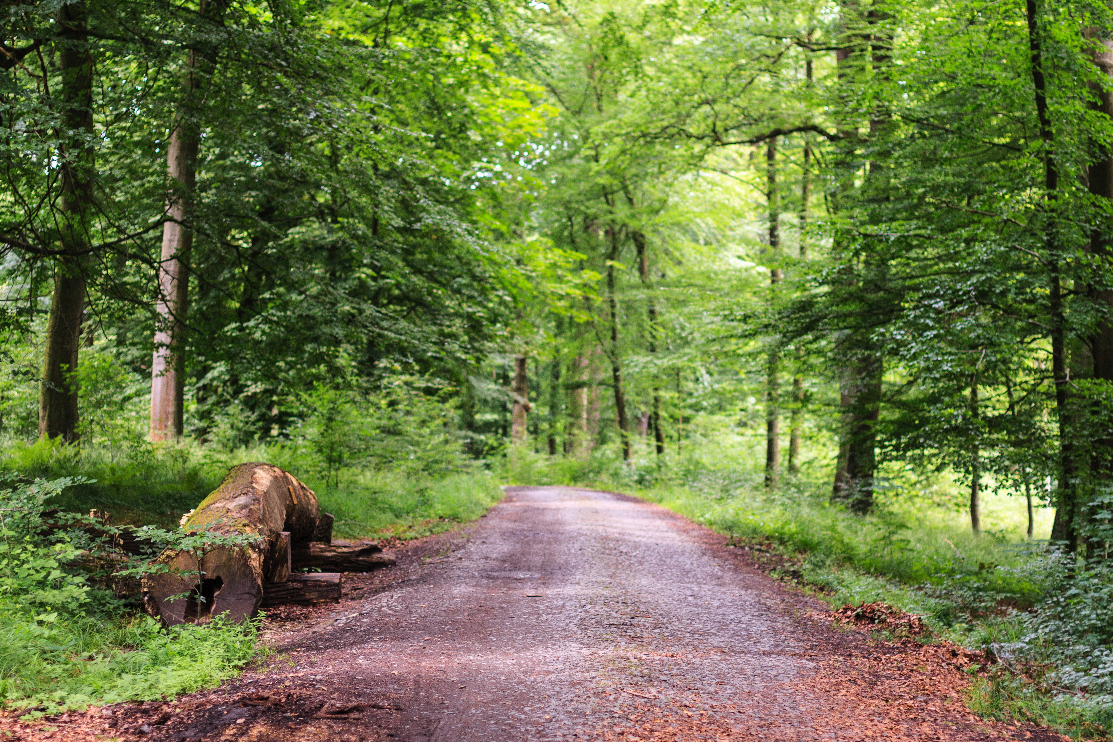 Waldweg im Wildwald Vosswinkel